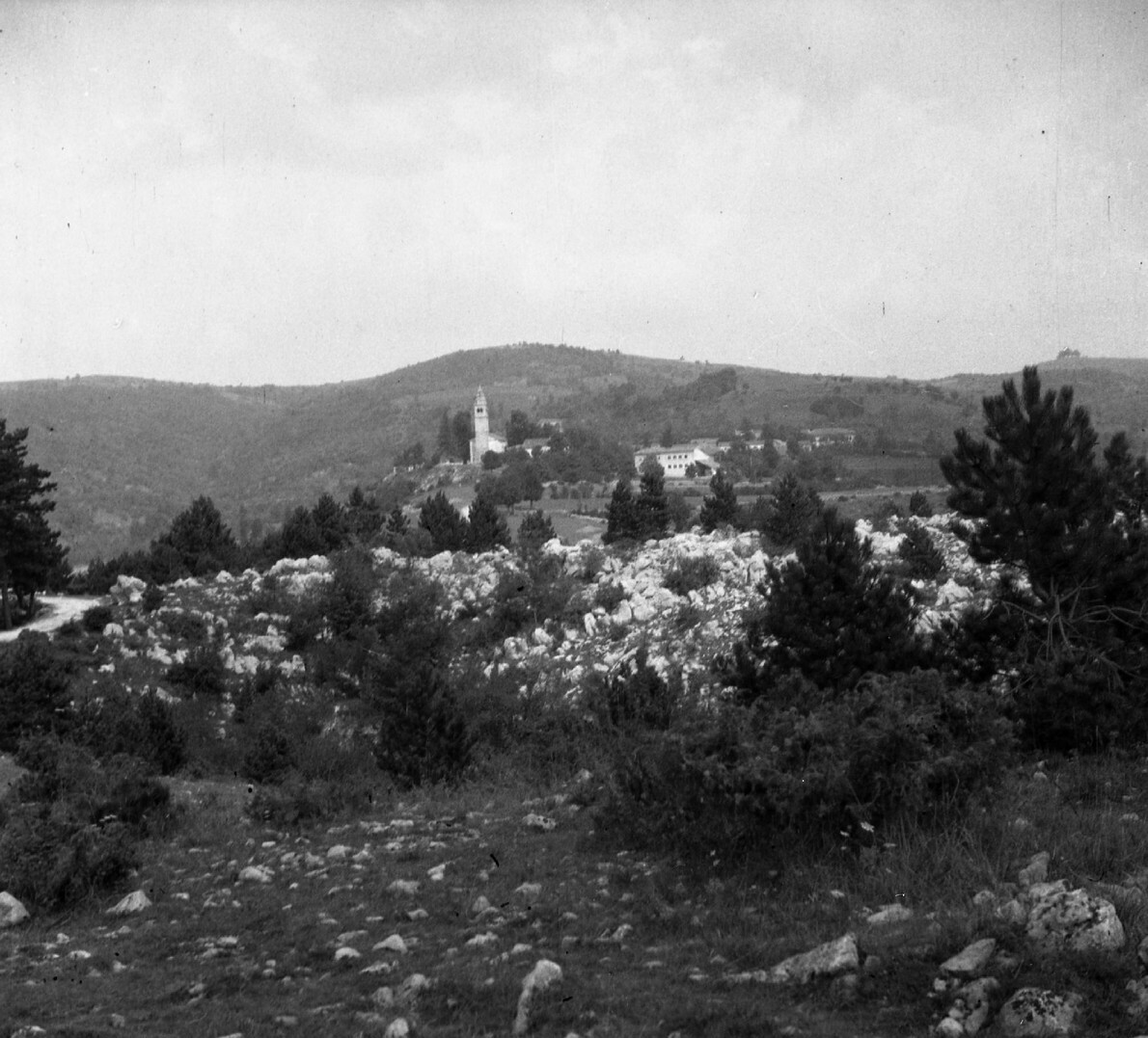 Vas Slivje.